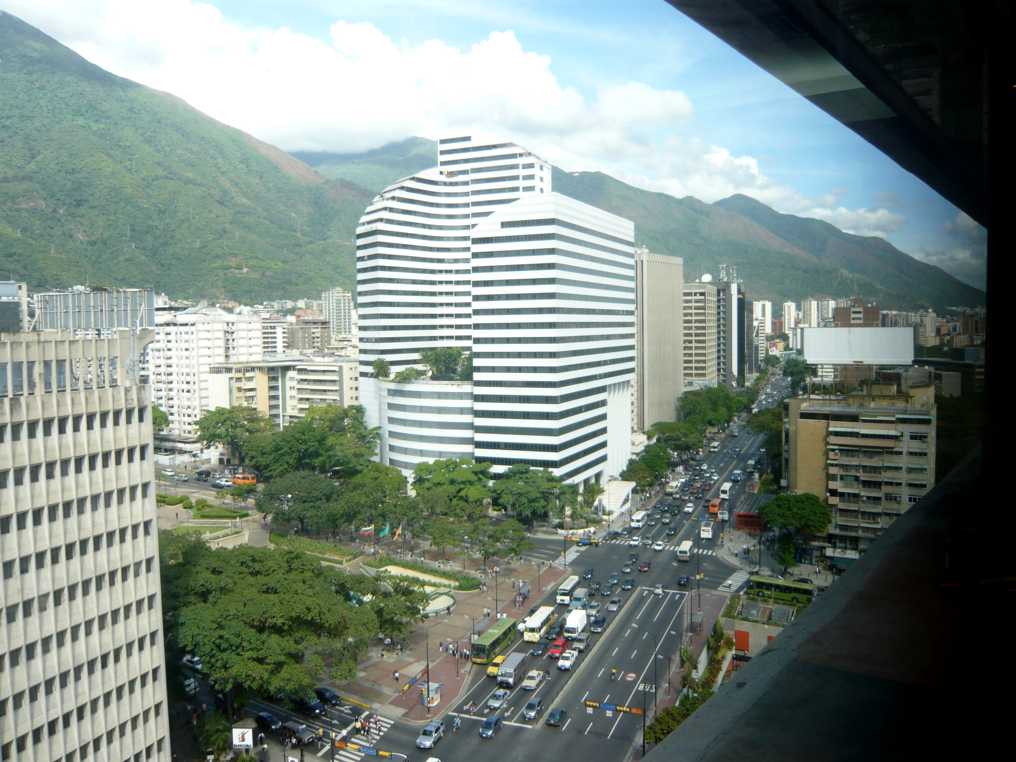 Avenida Francisco de Miranda. Sector Altamira